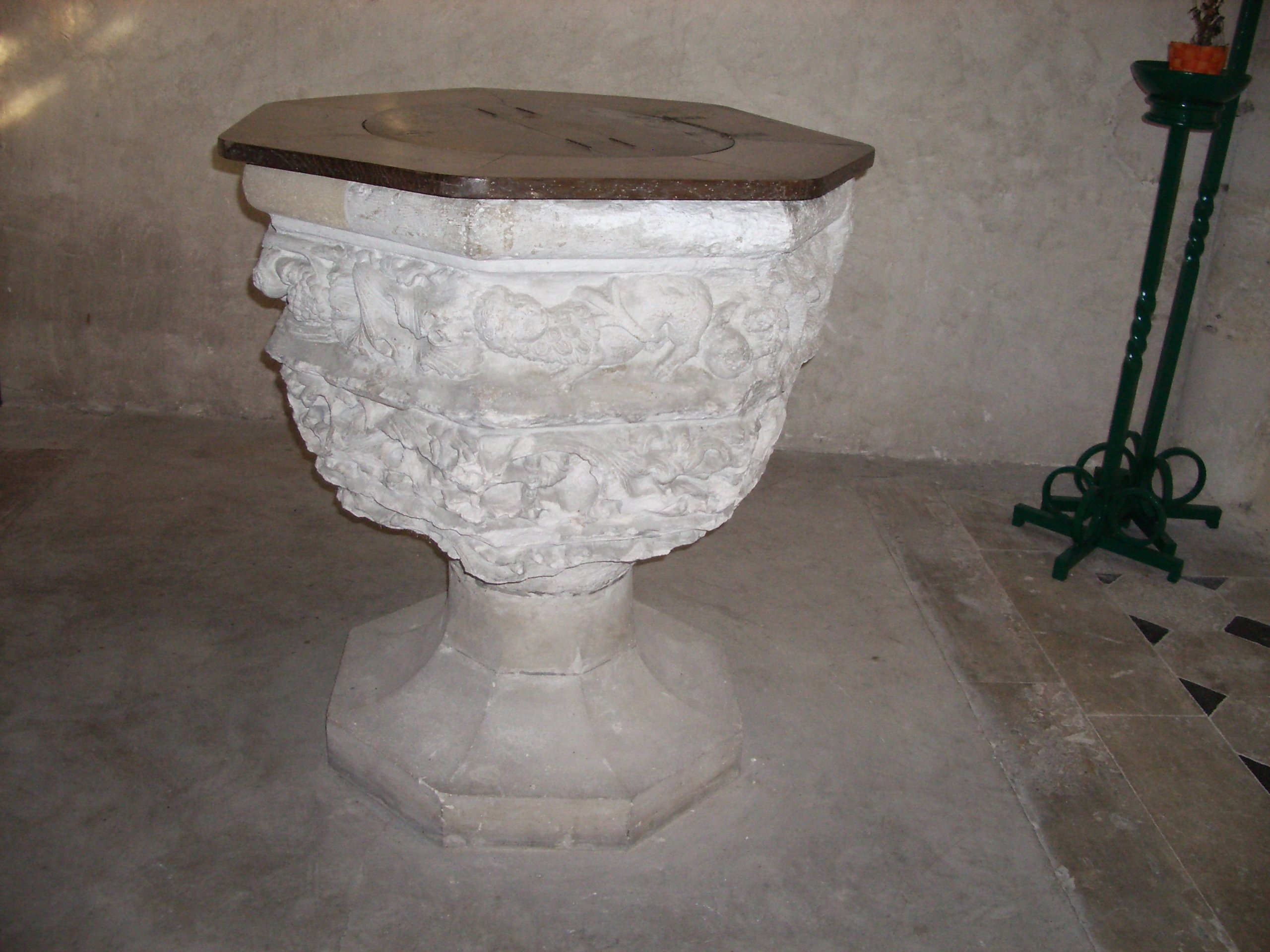 Les fonts baptismaux de l'église Saint Martin à Ivry-la-Bataille (Eure, Normandie, France).